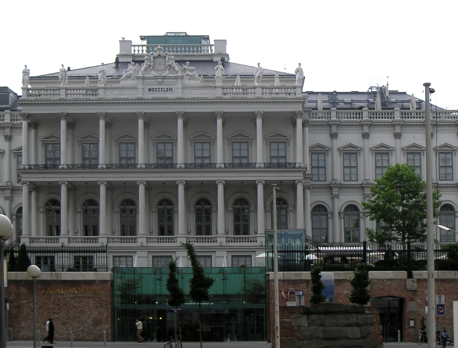 das Palais Coburg in Wien